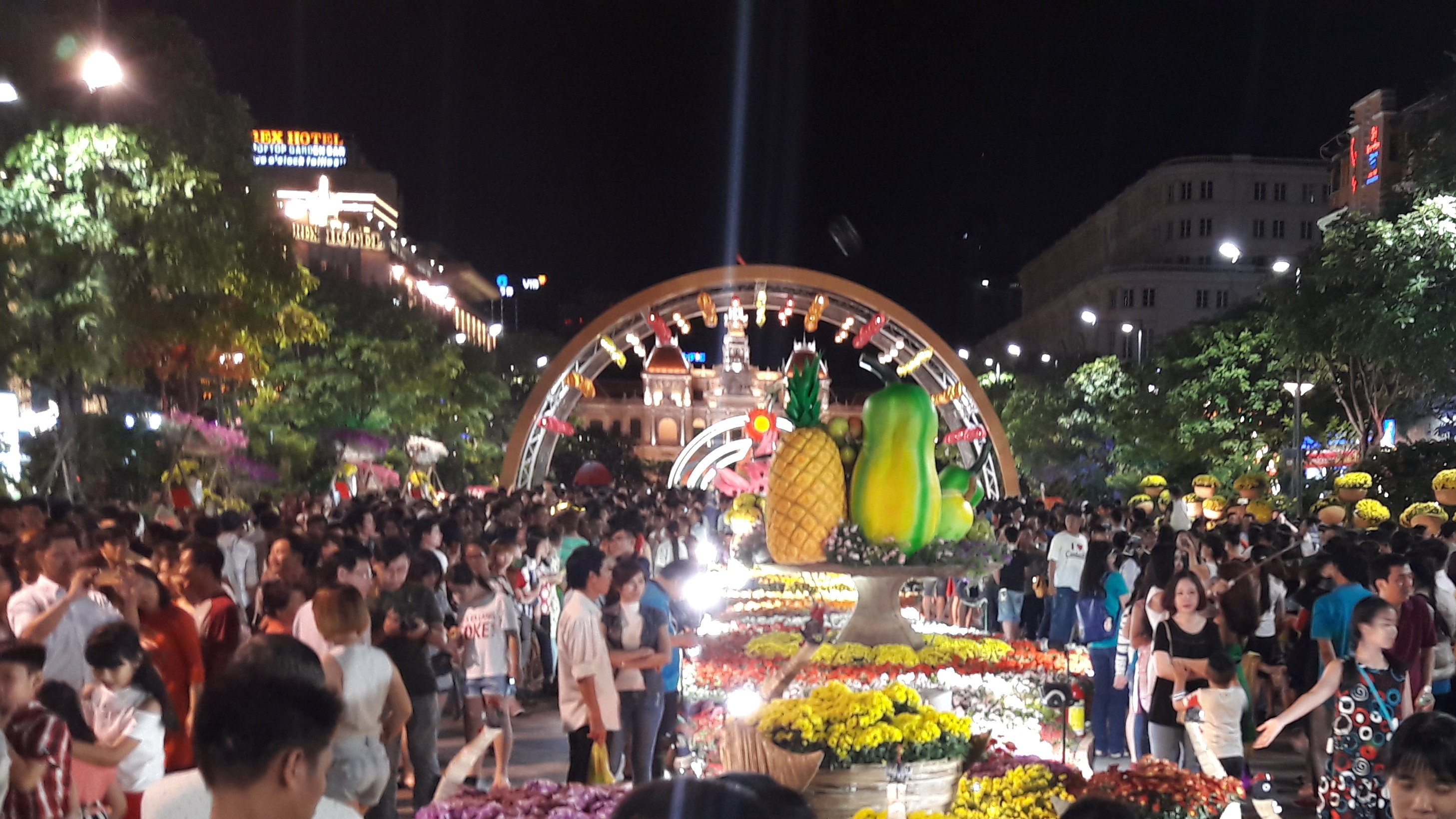 2017-02-06, HCM, Nguyuen Hue Str., Tet-Fest II